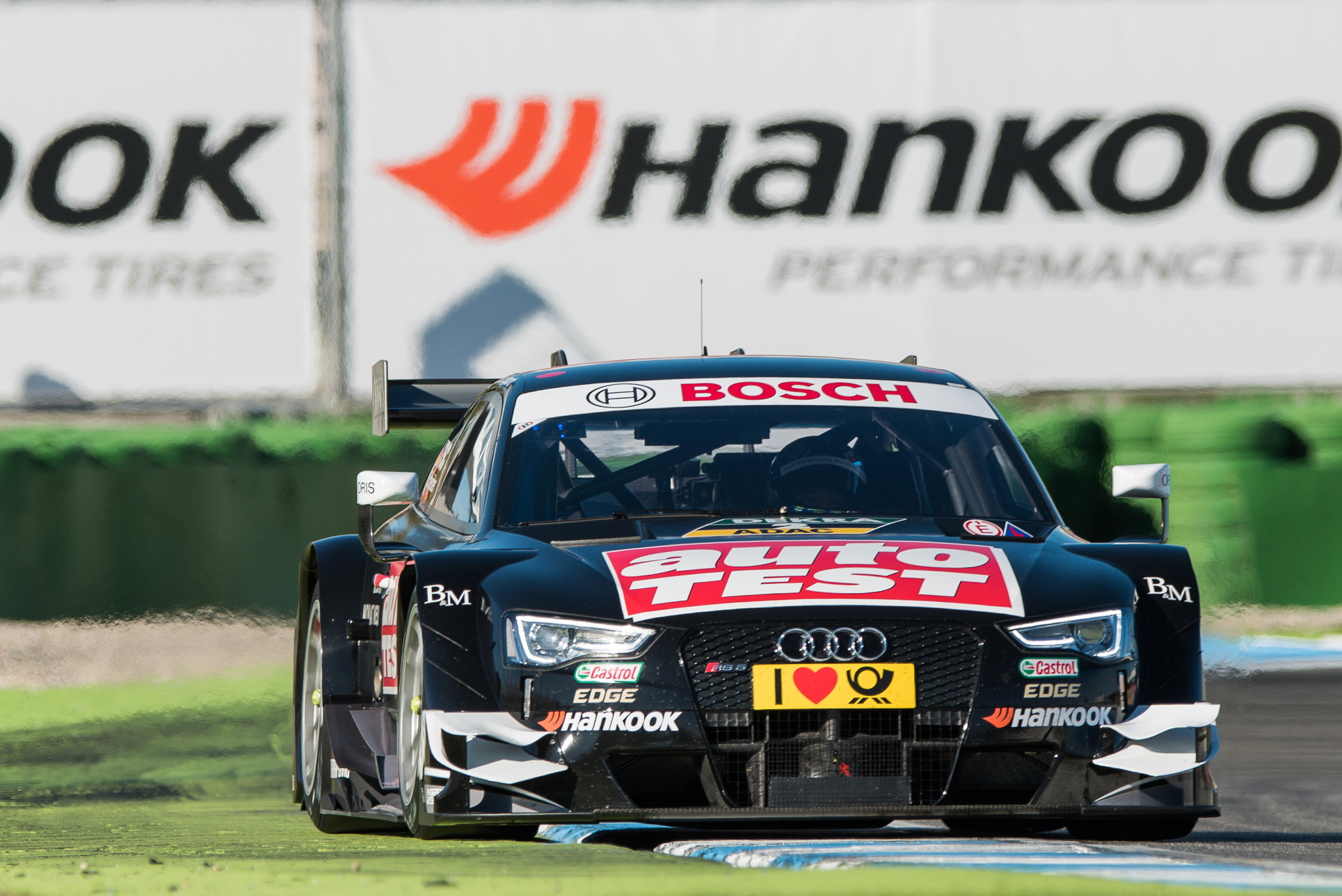 AUTO TEST Audi RS 5 DTM,DTM,Deutsche Tourenwagen Masters,Hockenheimring,Motorsport,Phoenix Racing GmbH,Timo Scheider